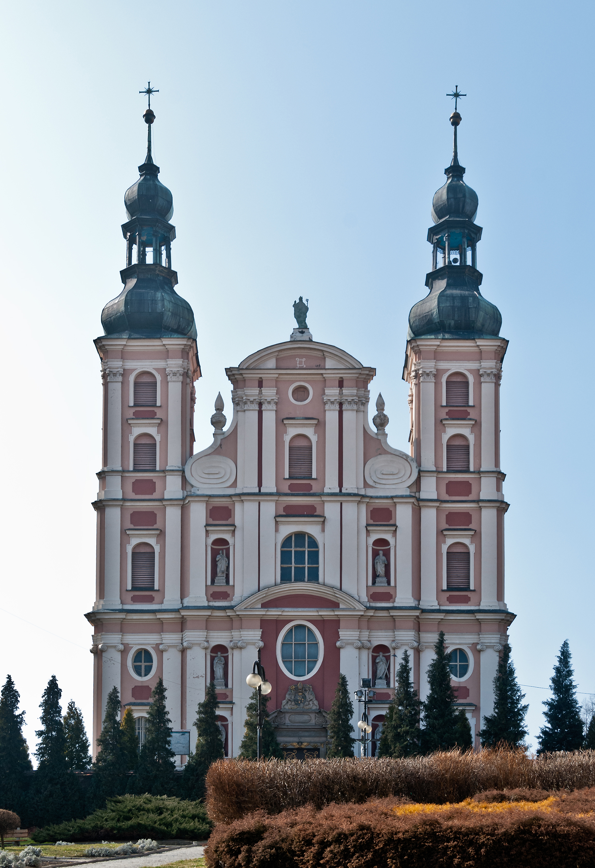 Otmuchów, kościół par. p.w. śś. Mikołaja i Franciszka Ksawerego, 1690-1701